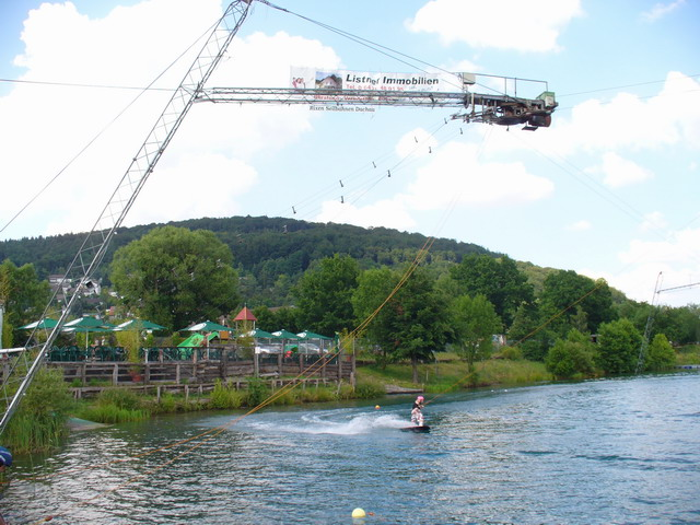 Wasserskianlange am Seepark Niederweimar.